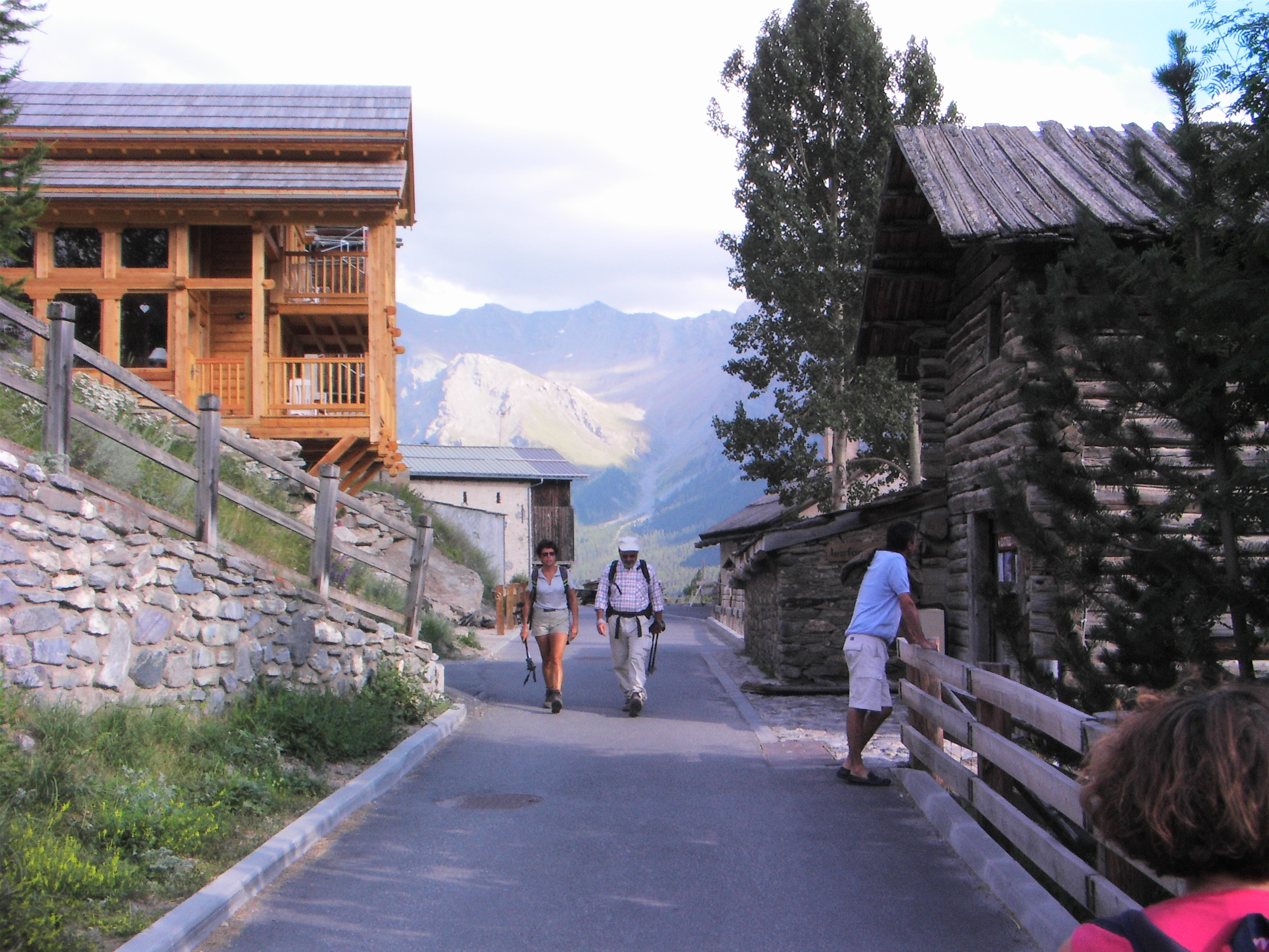 Saint-Véran en août 2008. France.